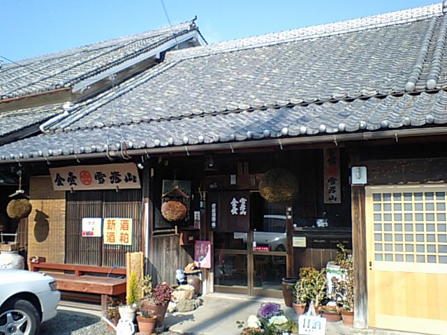 壺坂酒造（株） 本店